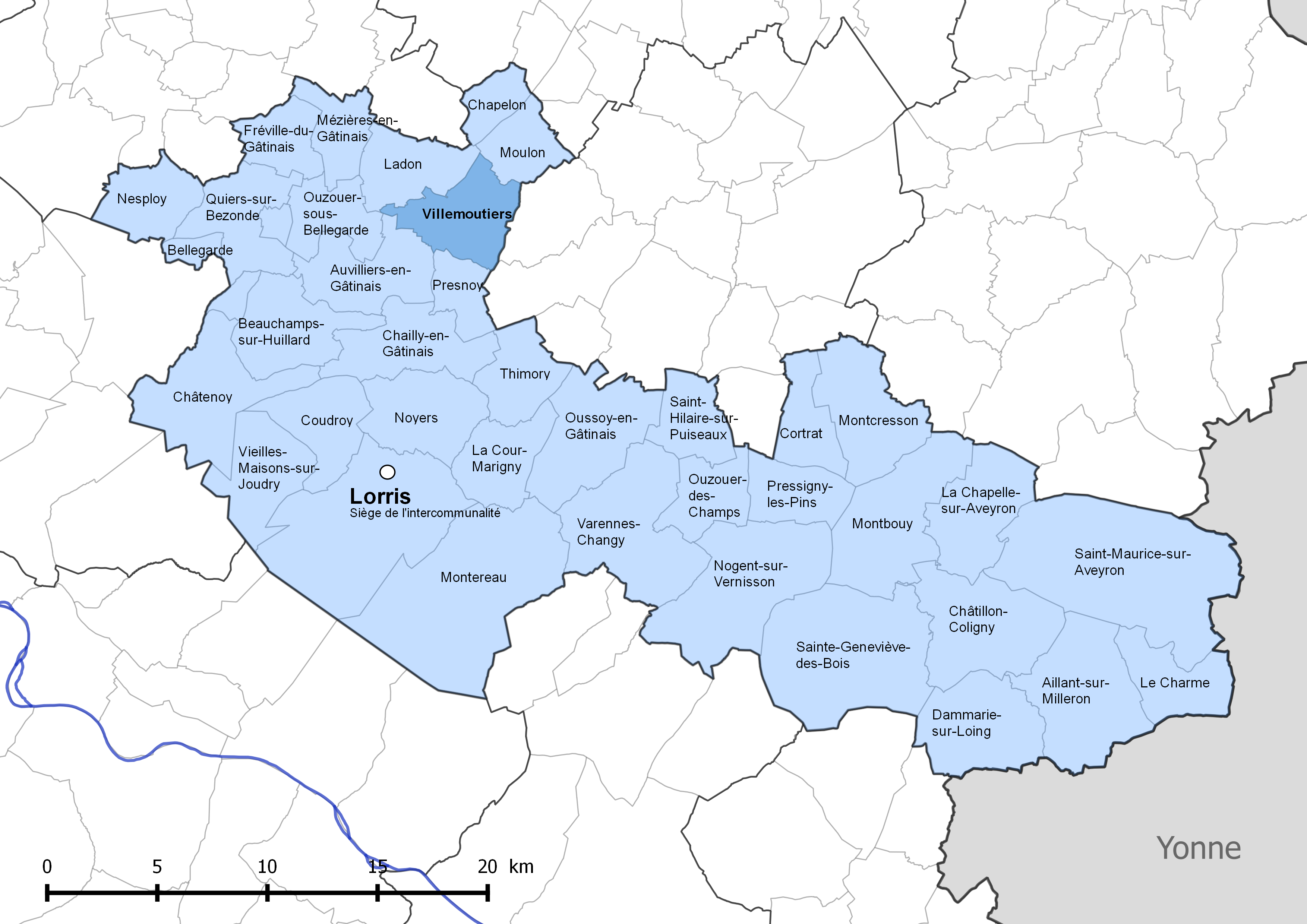 Périmètre de la communauté de communes Canaux et forêts en Gâtinais - Situation de la commune de Villemoutiers.